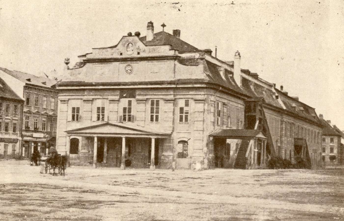 Das Theater wurde 1884 abgerissen und durch einen Neubau ersetzt.